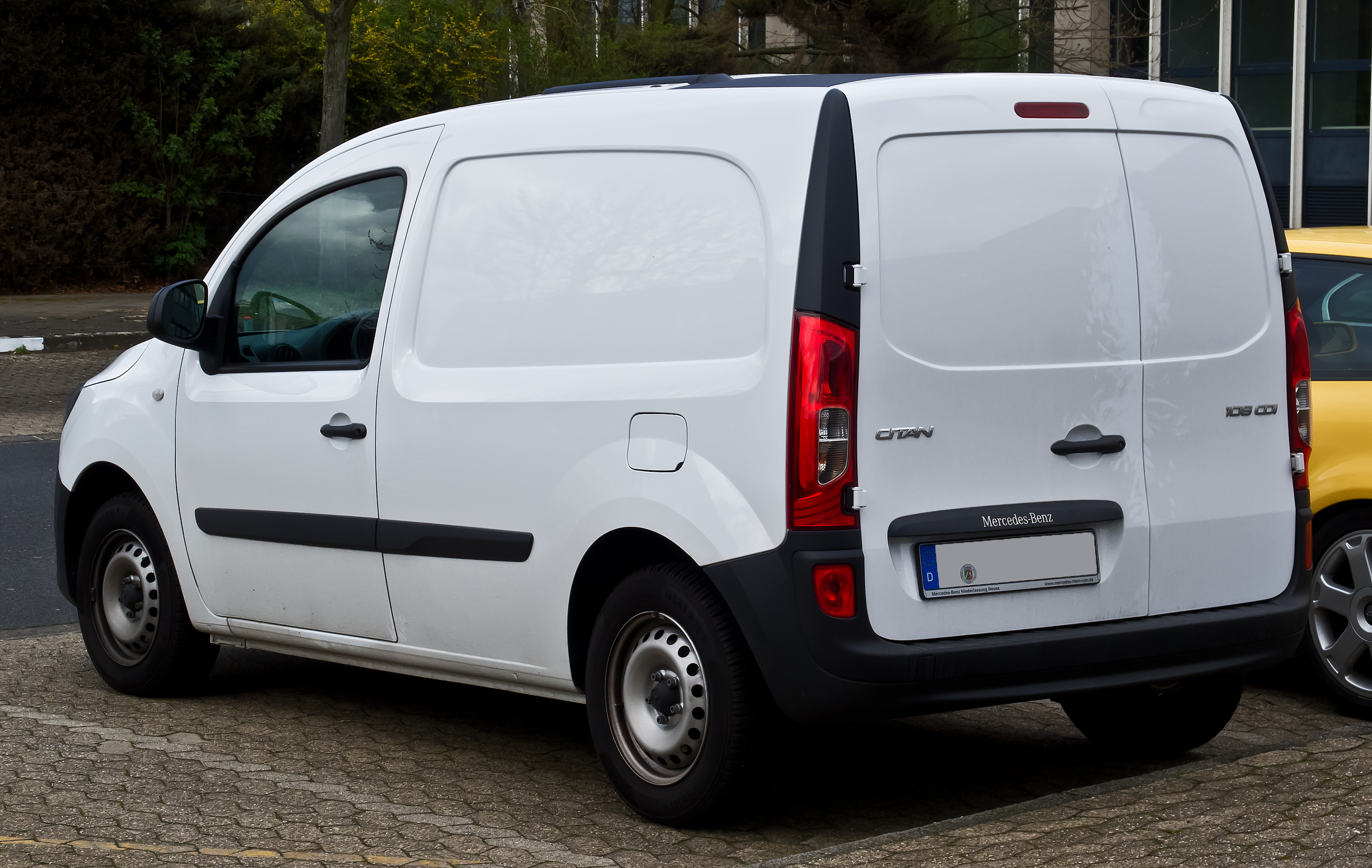 Mercedes-Benz Citan Kastenwagen Lang 108 CDI (W 415)